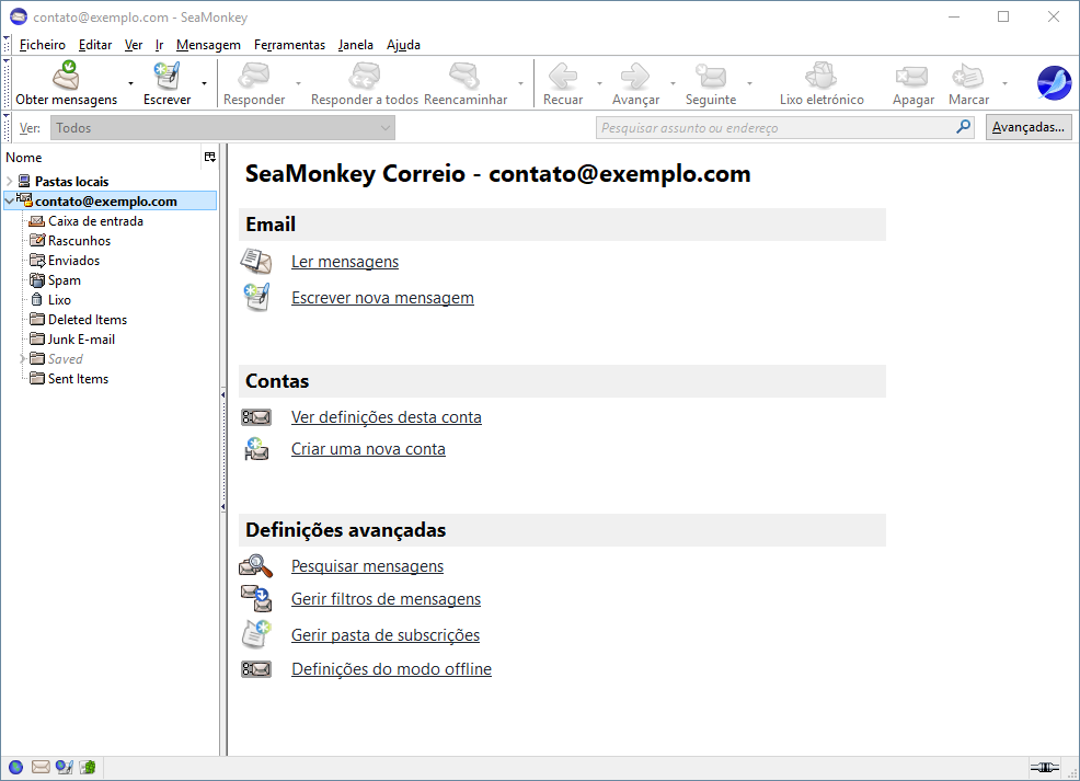 O cliente de e-mail SeaMonkey Mail & Newsgroups versão 2.46 rodando no Windows 10.